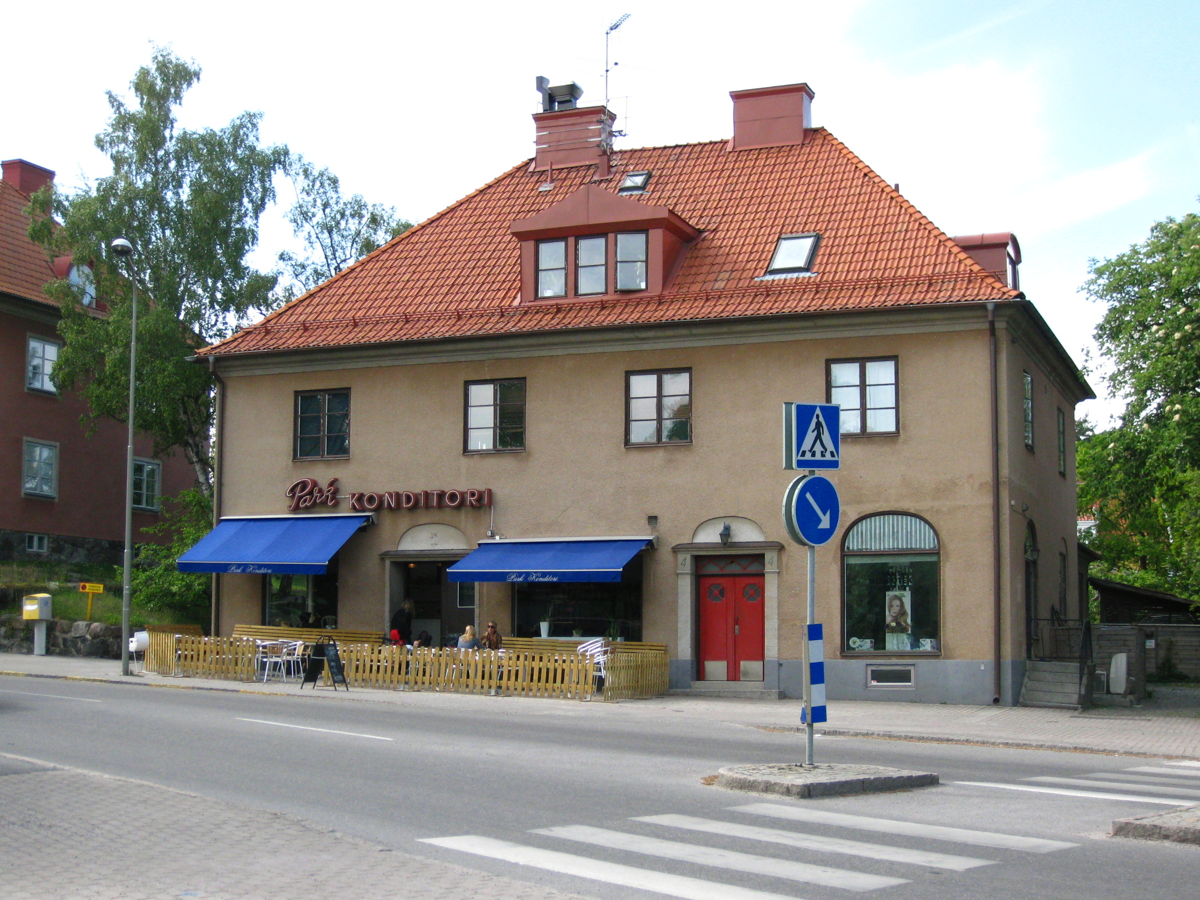 Park konditori, Alléparken, Äppelviken, Bromma, västra Stockholm. Byggnadsår 1923 av Berglund & Larsson Byggnadsfirma.